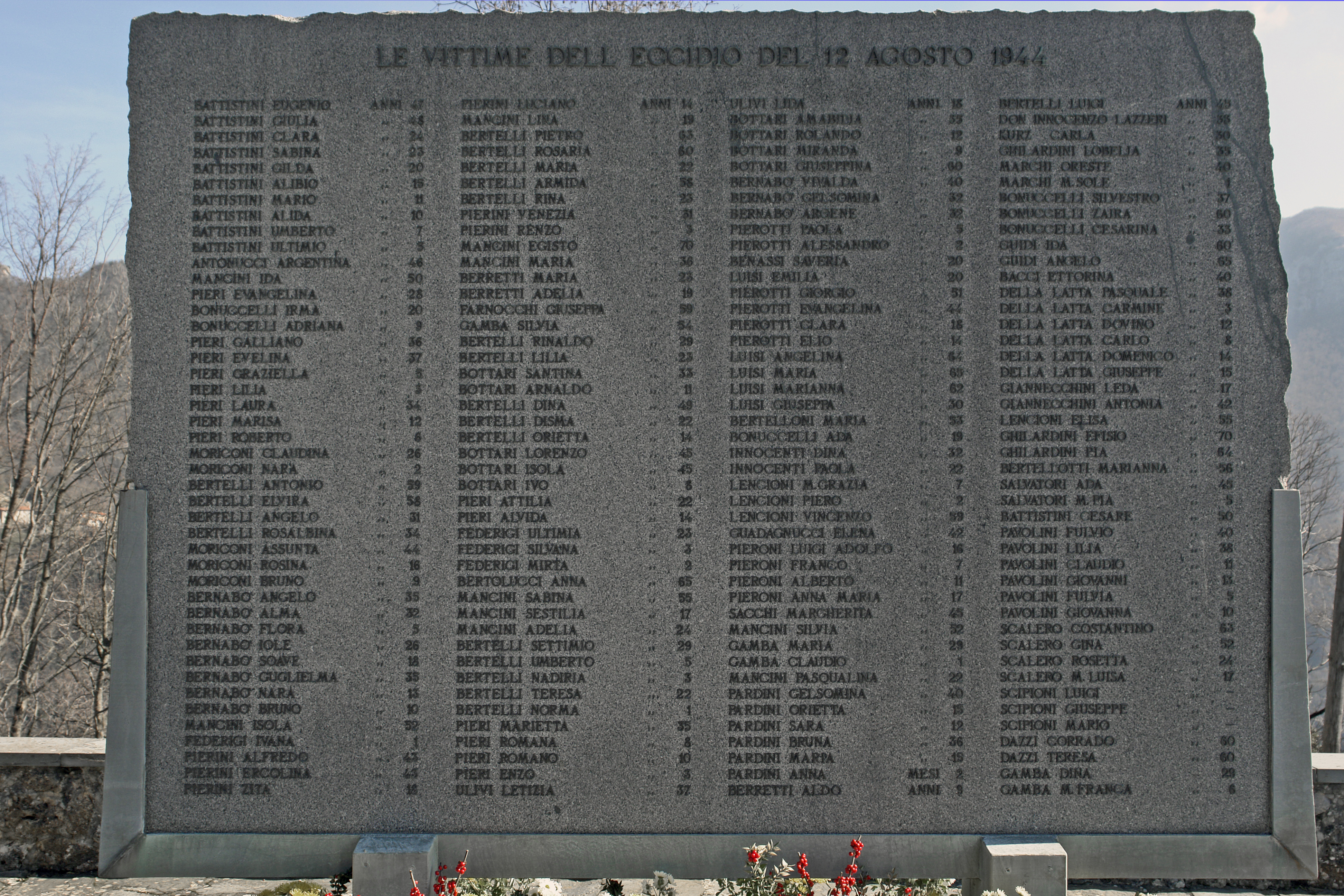 Sant' Anna di Stazzema, Opfertafel am Mahnmal